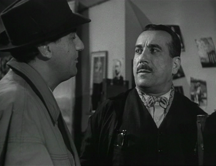 Screenshot del film Il segno di Venere (1955) di Dino Risi. Categoria:Immagini di Peppino De Filippo Categoria:Immagini di Alberto Sordi